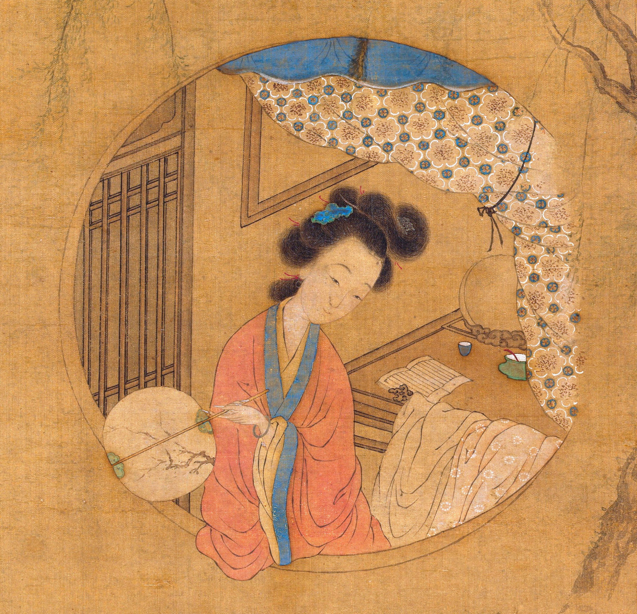 China; Hanging scroll; Paintings